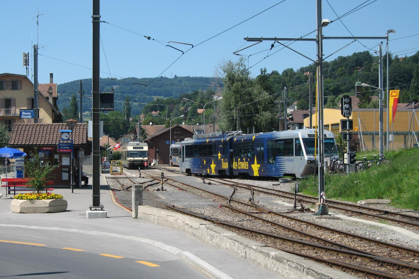 Bahnhof Blonay. Im Hintergrund der Bereich der Transports Montreux–Vevey–Riviera (MVR). In der Mitte befindet sich der für die Fahrt nach Vevey bereitstehende Be 2/6 7003 Blonay. Rechts fährt gerade der Niederflur Steuerwagen Bt 224 vor dem fest gekuppelten Triebwagen mit gemischtem Adhäsions- und Zahnradantrieb Beh 2/4 71 in Richtung Les Pléiades ab. Zuvorderst befindt sich der Kk 502. Ganz im Hintergrund rechts befindet sich etwas abgedeckt der Triebwagen mit gemischtem Adhäsions- und Zahnradantrieb Beh 2/4 72. Im Vordergrund links befindet sich der Bereich der Museumsbahn Blonay–Chamby (BC).